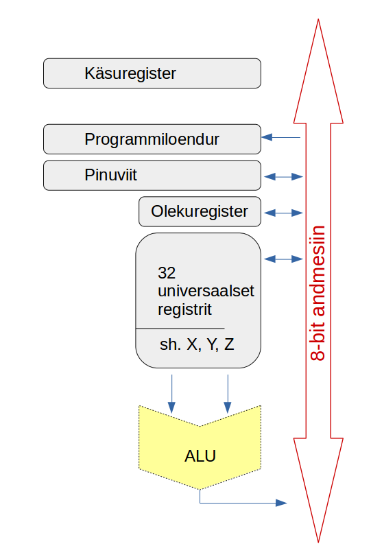 Tasub tähele panna, et protsessoril jooksev programm programmiloendurist lugeda ei saa; ning käsuregistri sisuga ei ole üldse pistmist.